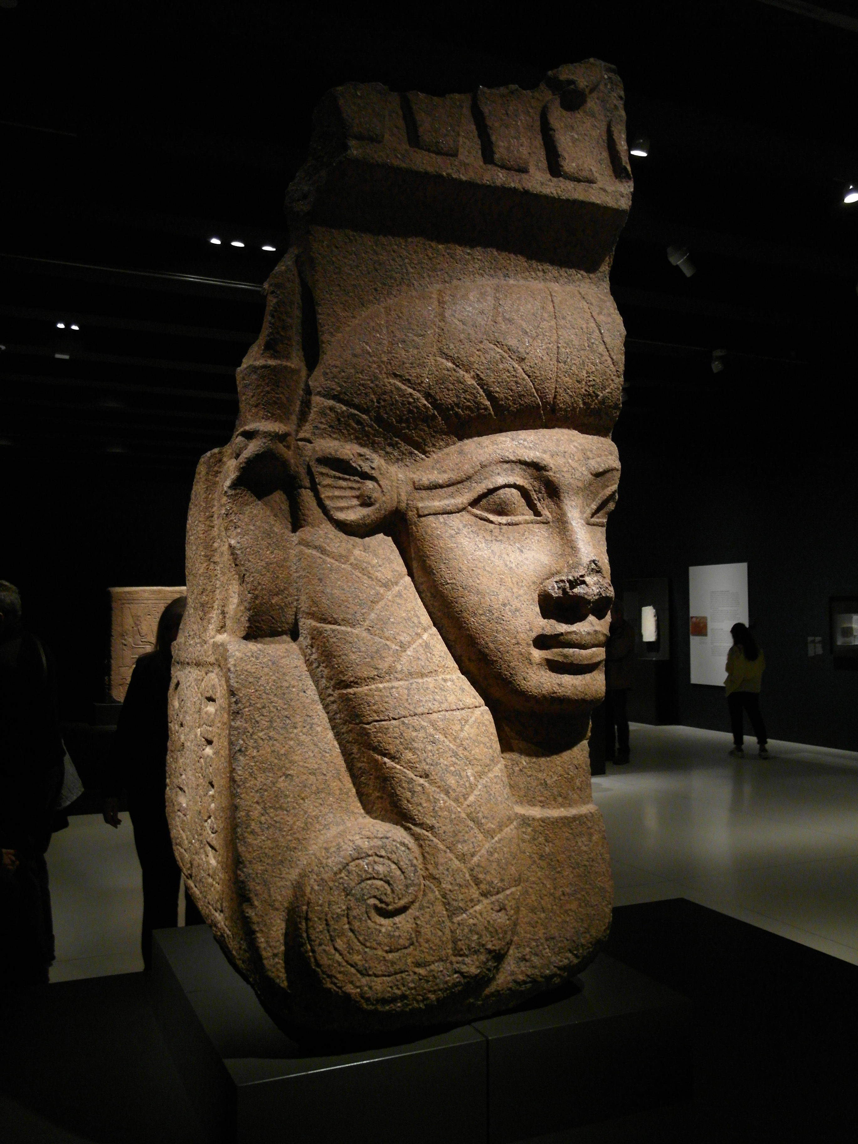 Capitel de granito rojo en forma de cabeza de Hathor. Dinastía XXII, reaindo de Osorcón II (hacia 874-850 a. C.). Templo de bastet en Bubastis. EA 1107.